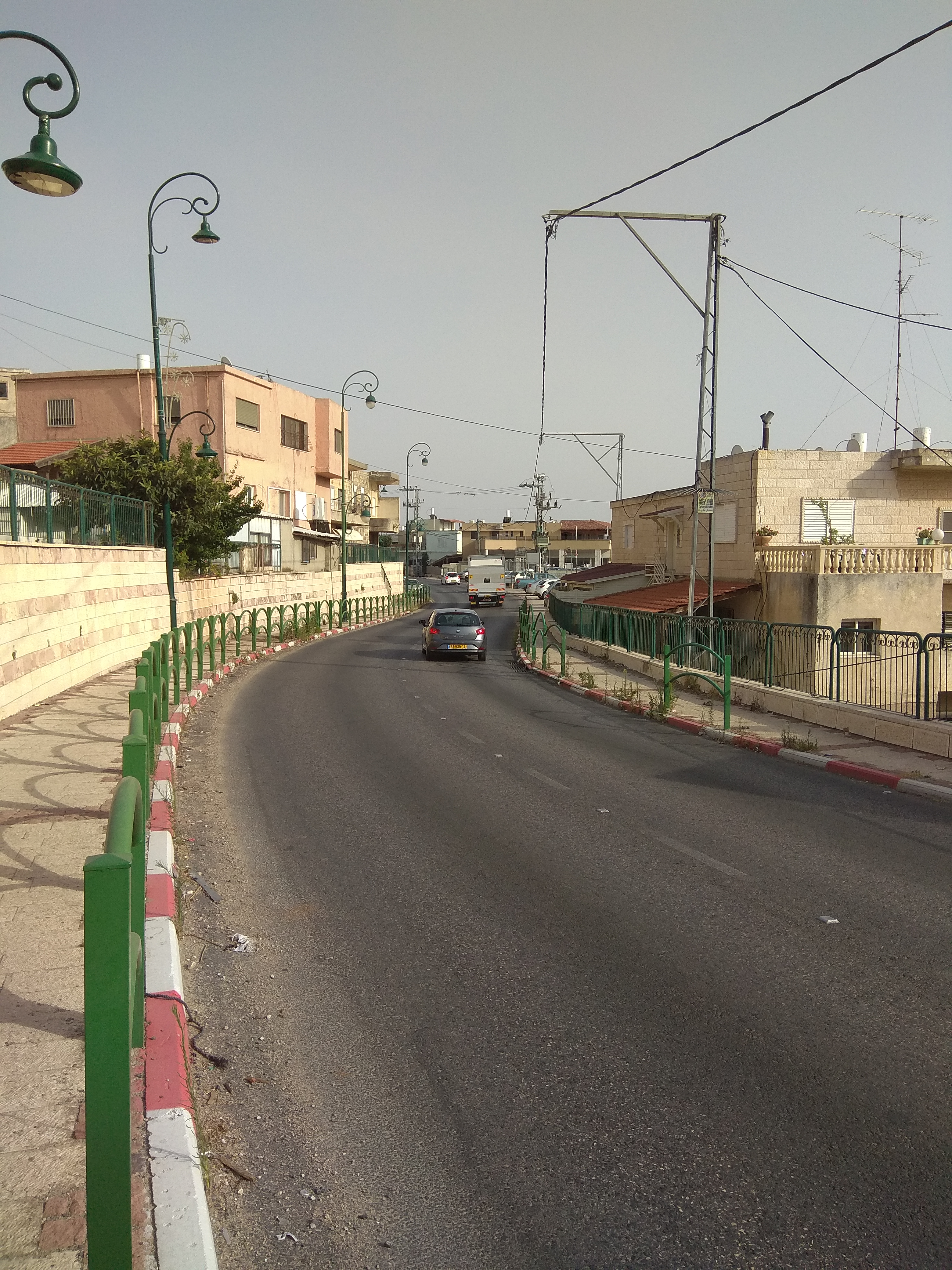 כביש 672 בתחומי עספיא